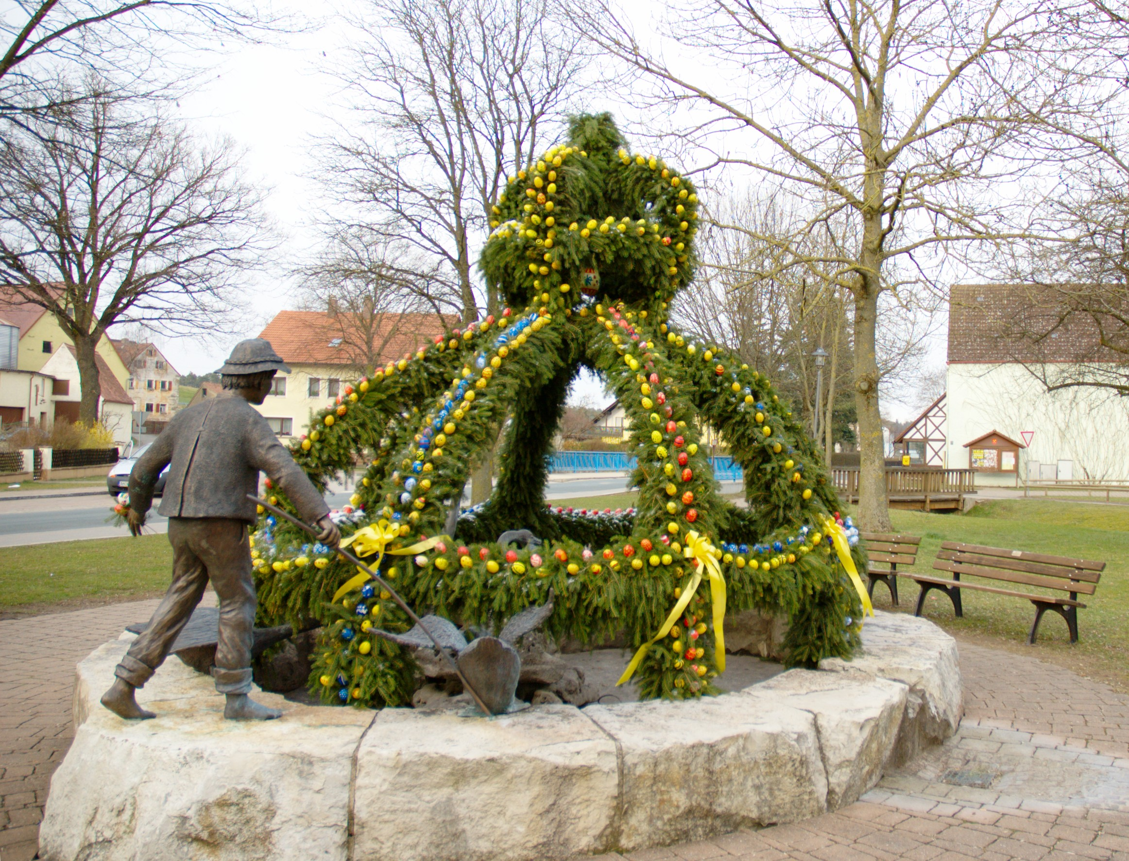 Mitteleschenbach, Osterbrunnen